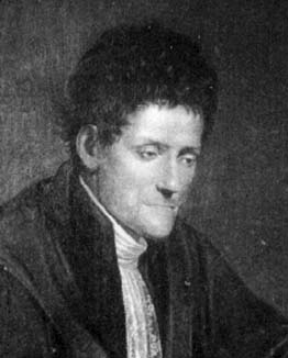 Portrait du mathématicien Paolo Ruffini (le tableau date de deux siècles, il est donc dans le domaine publique. La source indique clairement qu'elle ne possède pas le copyright.